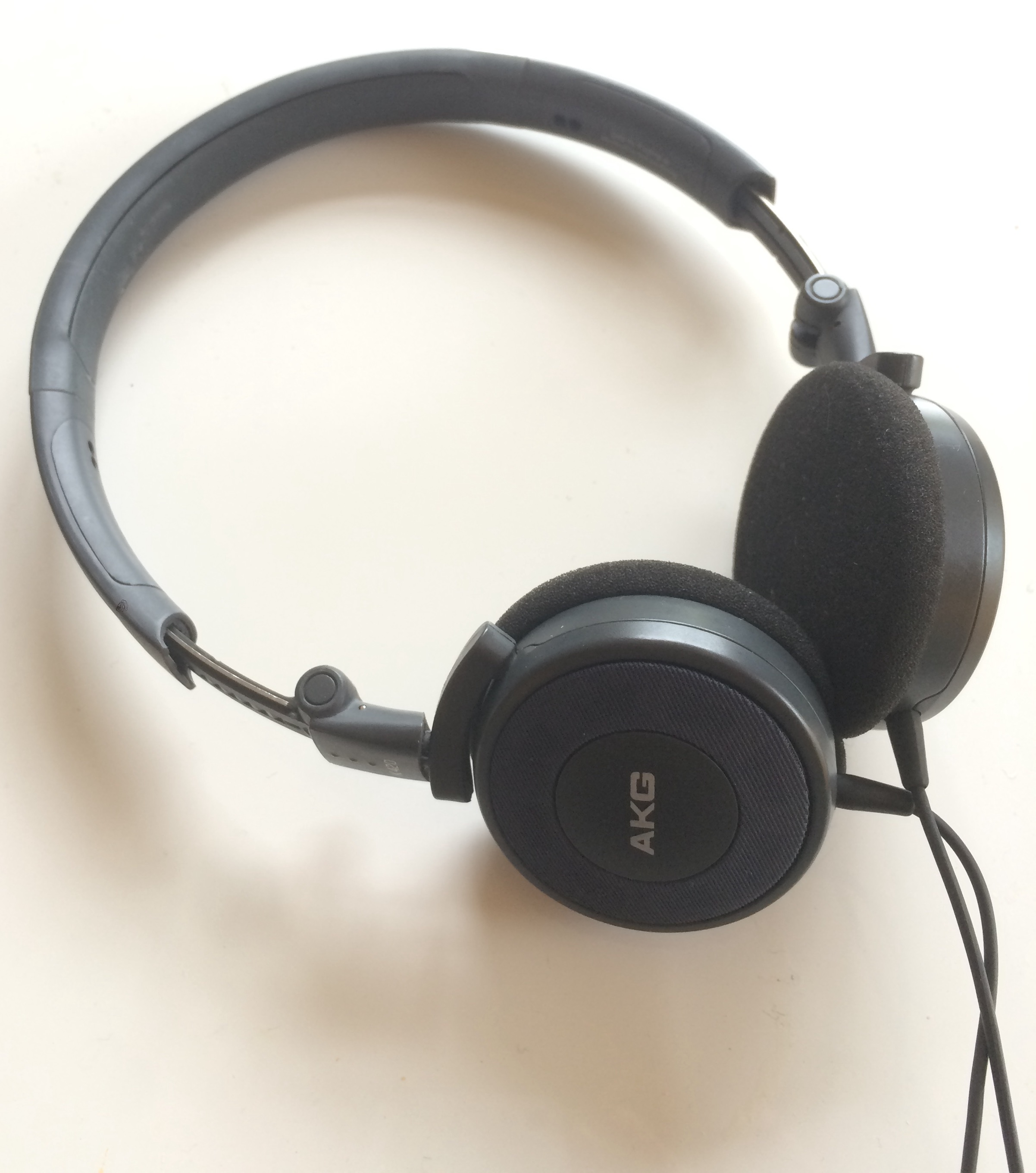 AKG Kopfhörer